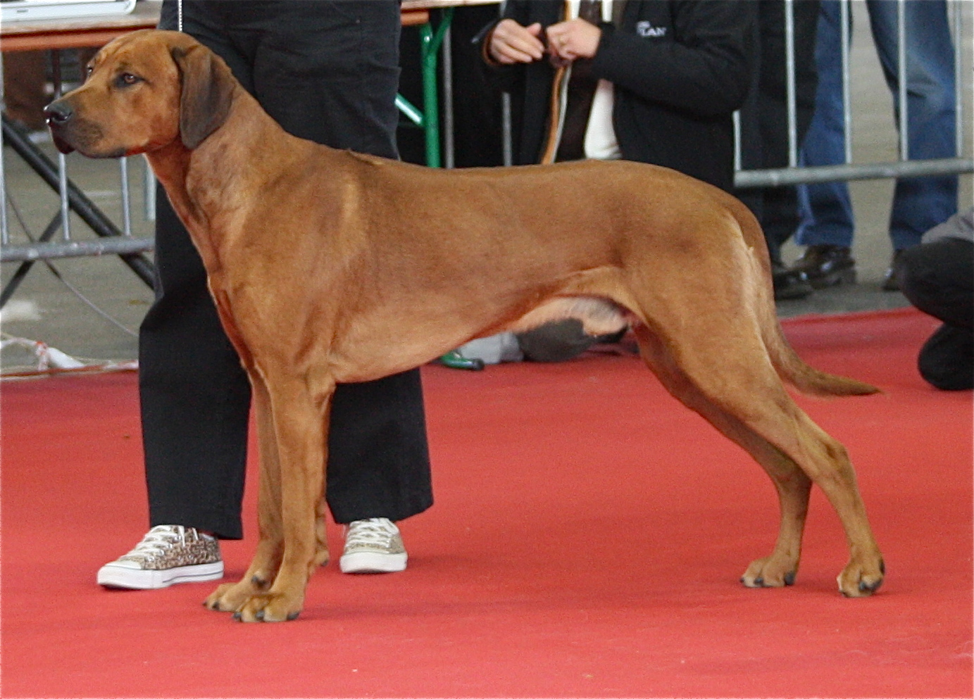 Rhodesian Ridgeback Rassehundeausstellung